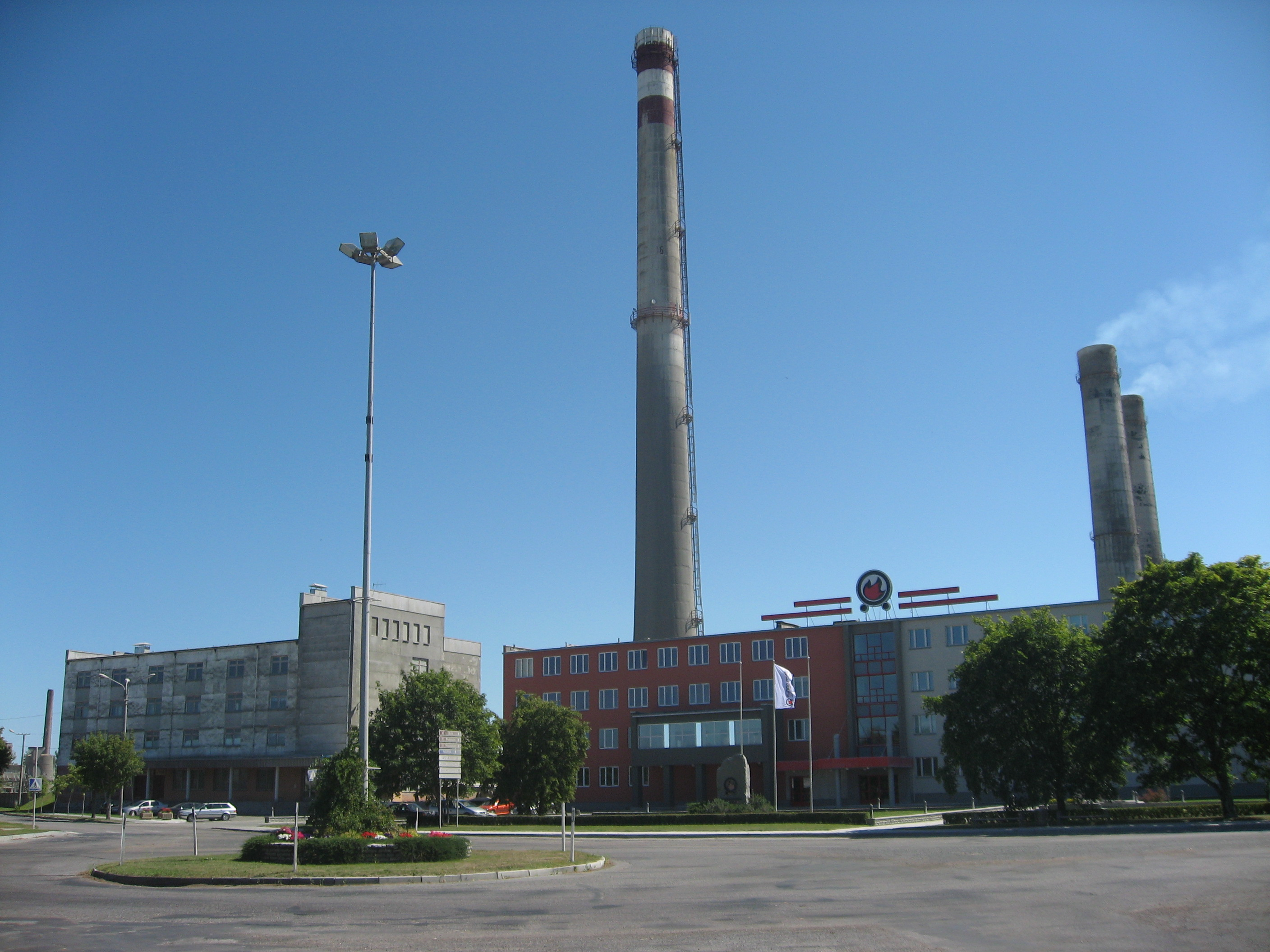 Kunda, továrna